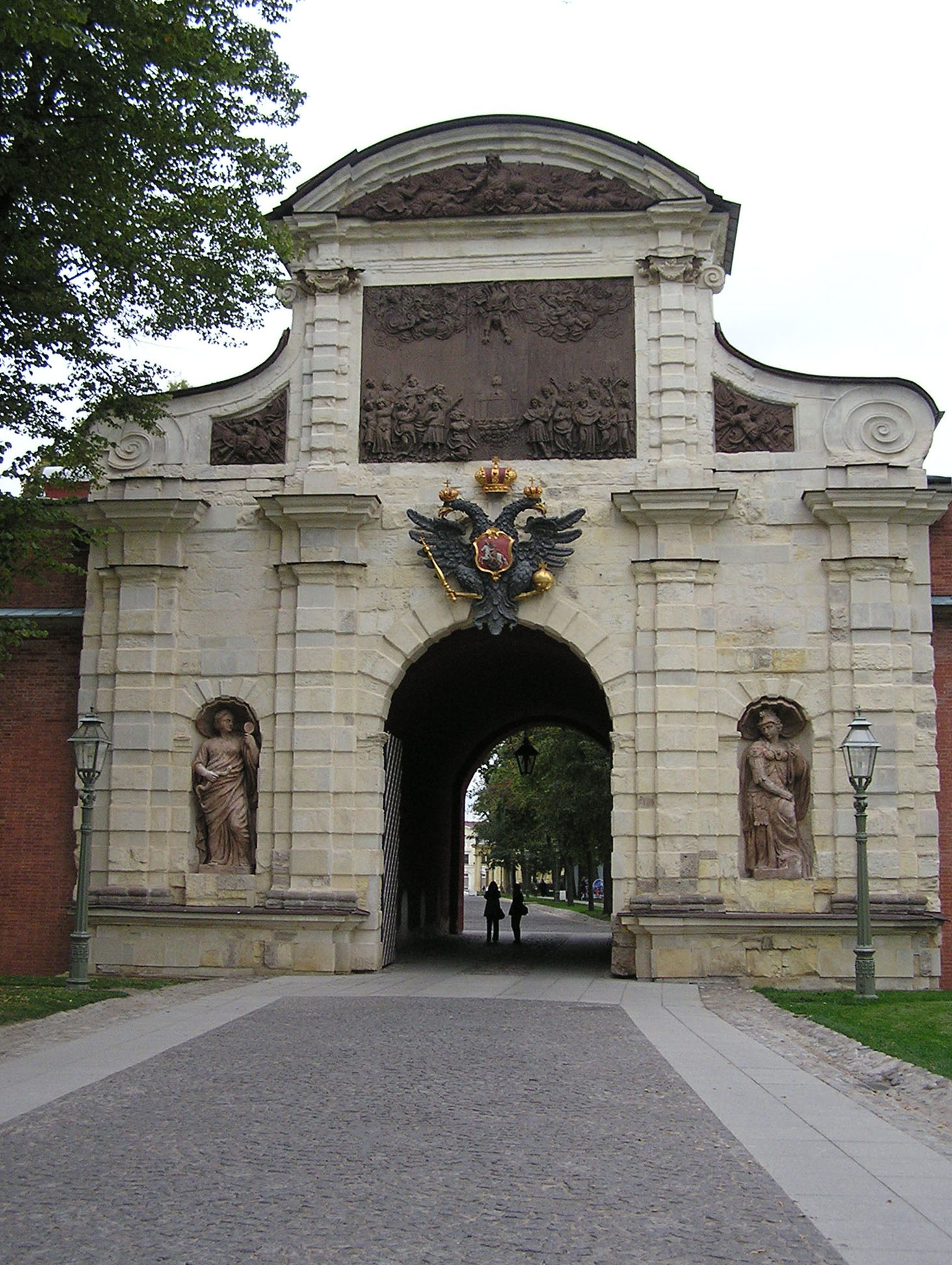 Санкт-Петербург. Петропавловская крепость. Петровские ворота